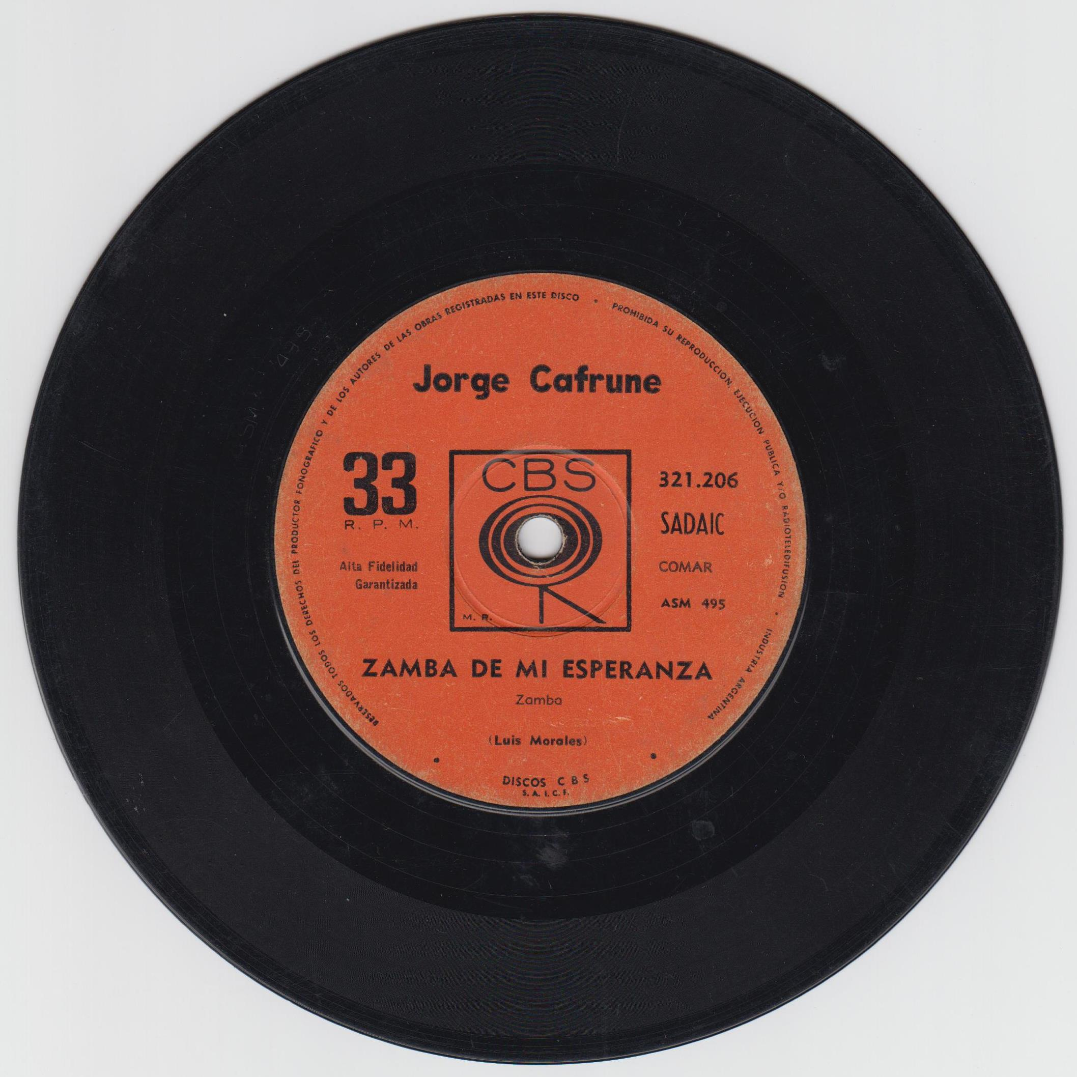 Sencillo de Jorge Cafrune con las canciones "Zamba de mi esperanza" y "El pescador".